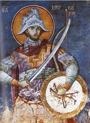 Saint Mercurius (224 – 250). Fresco bt Manuil Panselin, Afon. Св. Меркурий. Фреска Мануила Панселина. Афон. Карея. Протат